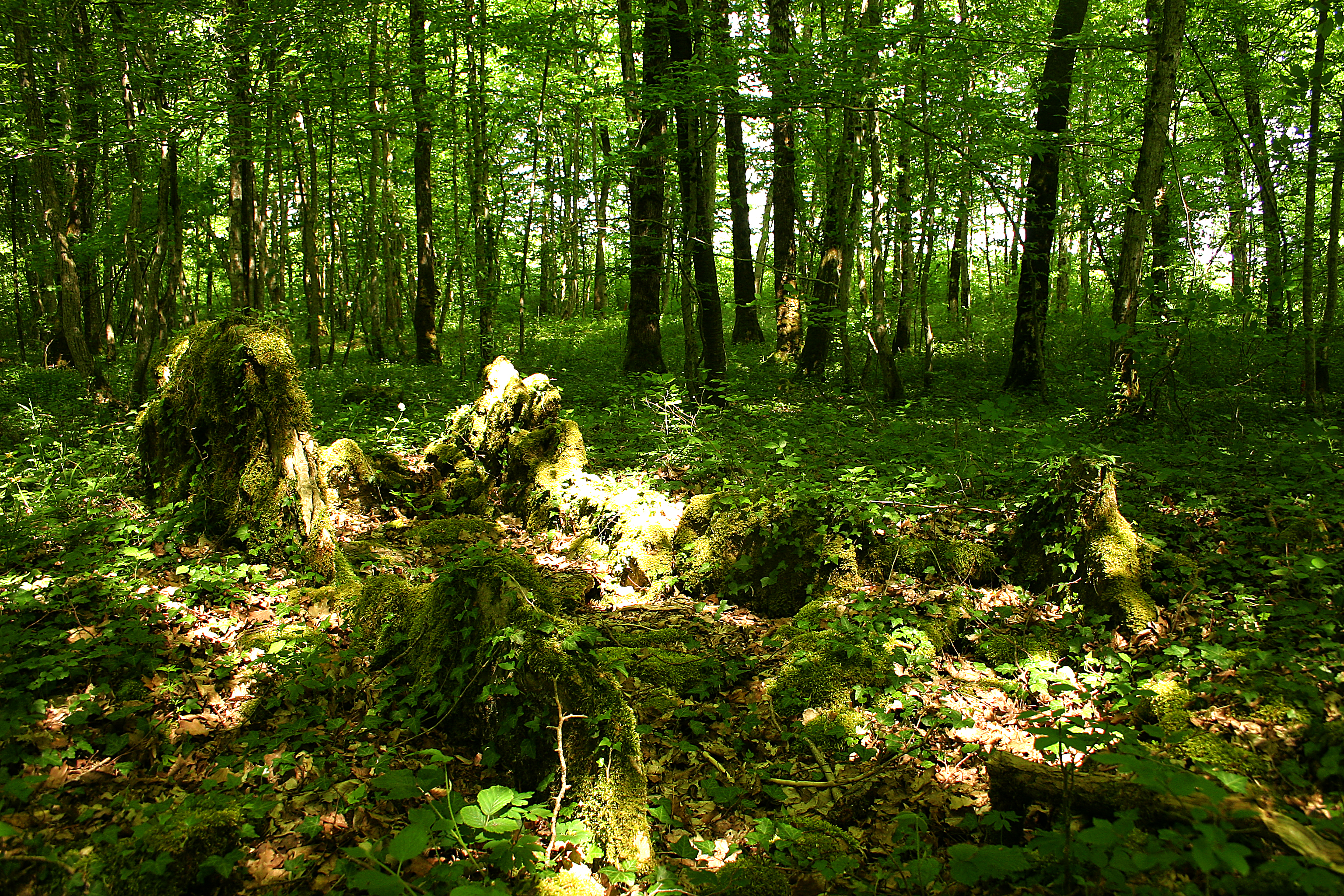 Sépulture néolithique .